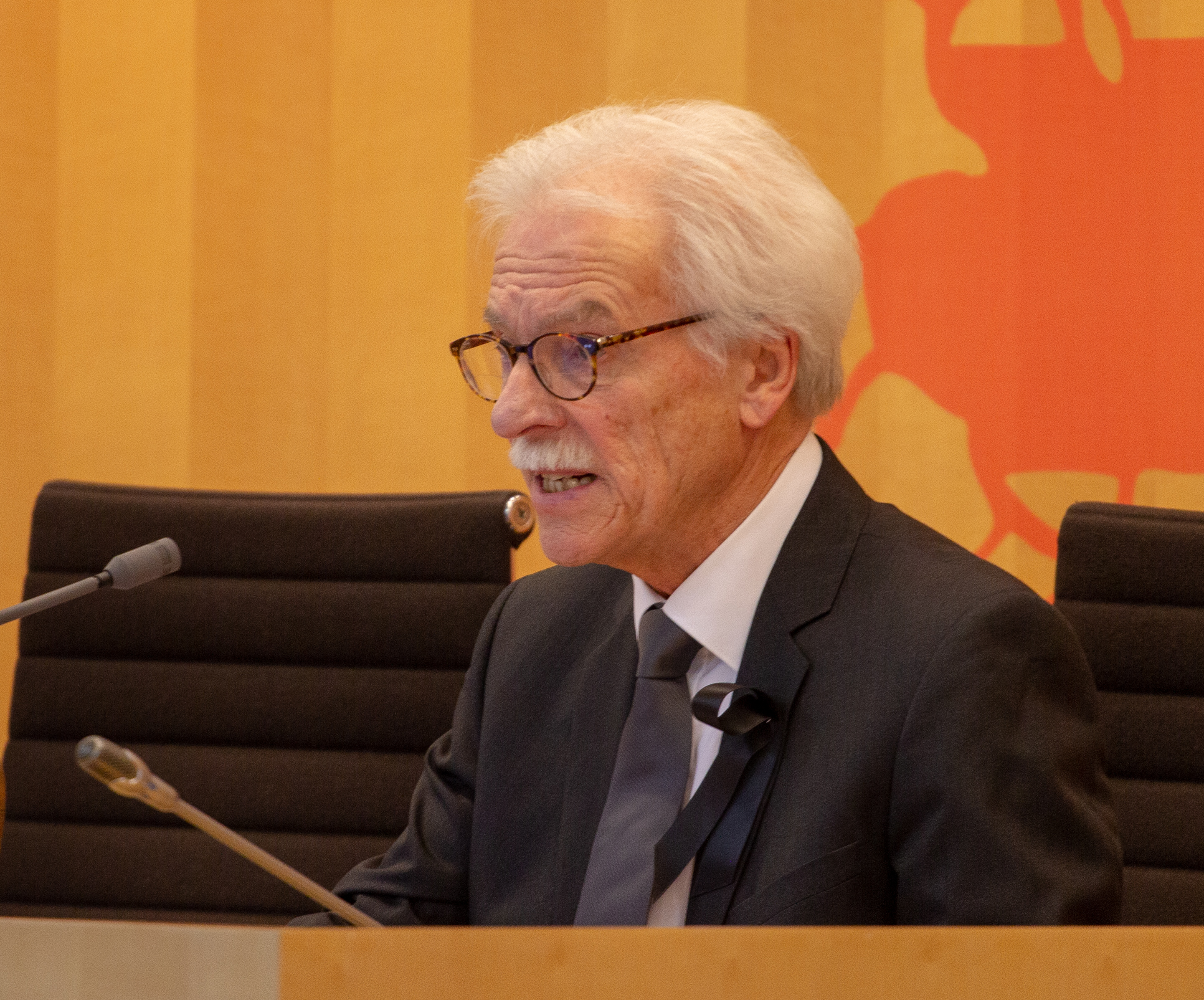 Konstituierende Sitzung des Hessischen Landtages am 18. Januar 2019 in Wiesbaden.